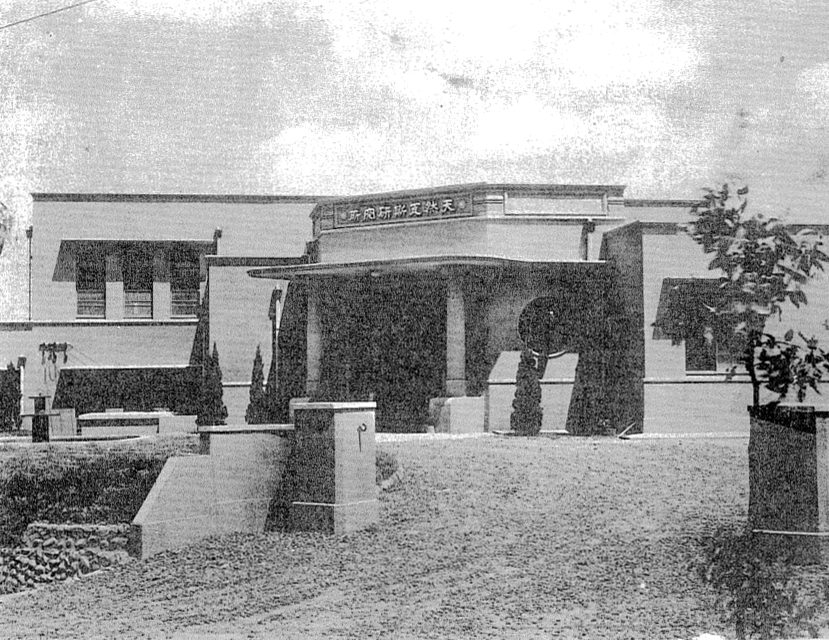 中文（台灣）: 天然瓦斯研究所廳舍外觀，現位於工業研究院光復院區